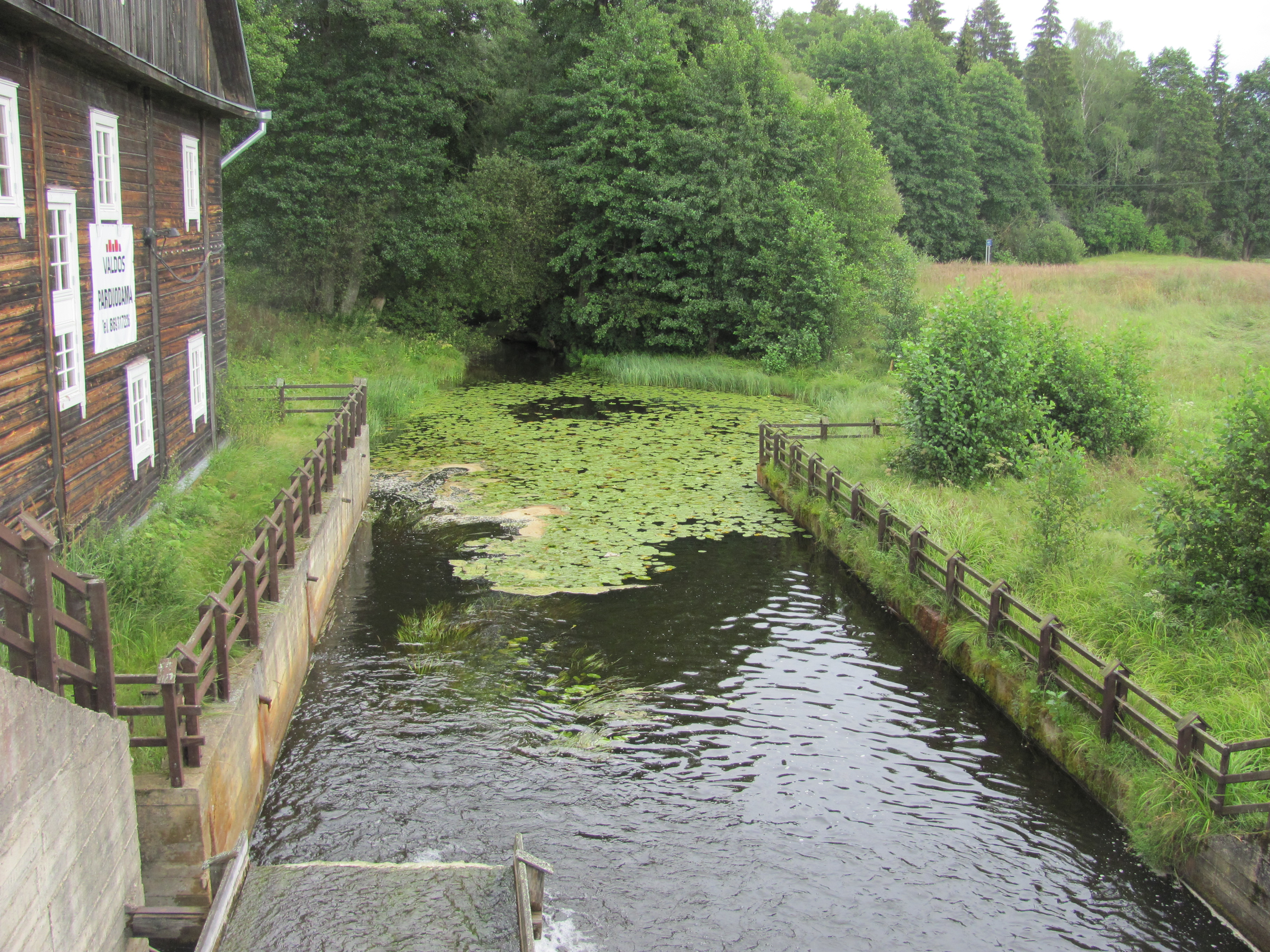 Minčia 28303, Lithuania